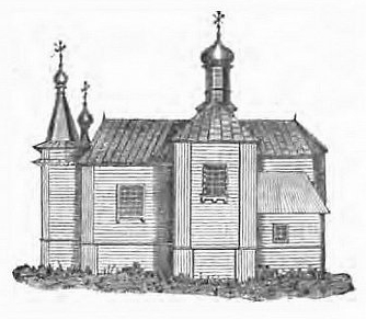 Беларуская (тарашкевіца): Кавалі (Kavali). Царква па маскоўскай перабудове